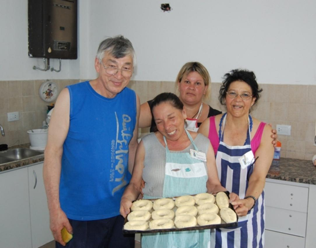 En la festividad de san blas, es tradicion, para los paraguayos, al finalizar la oracion o misa. se repartan chipas